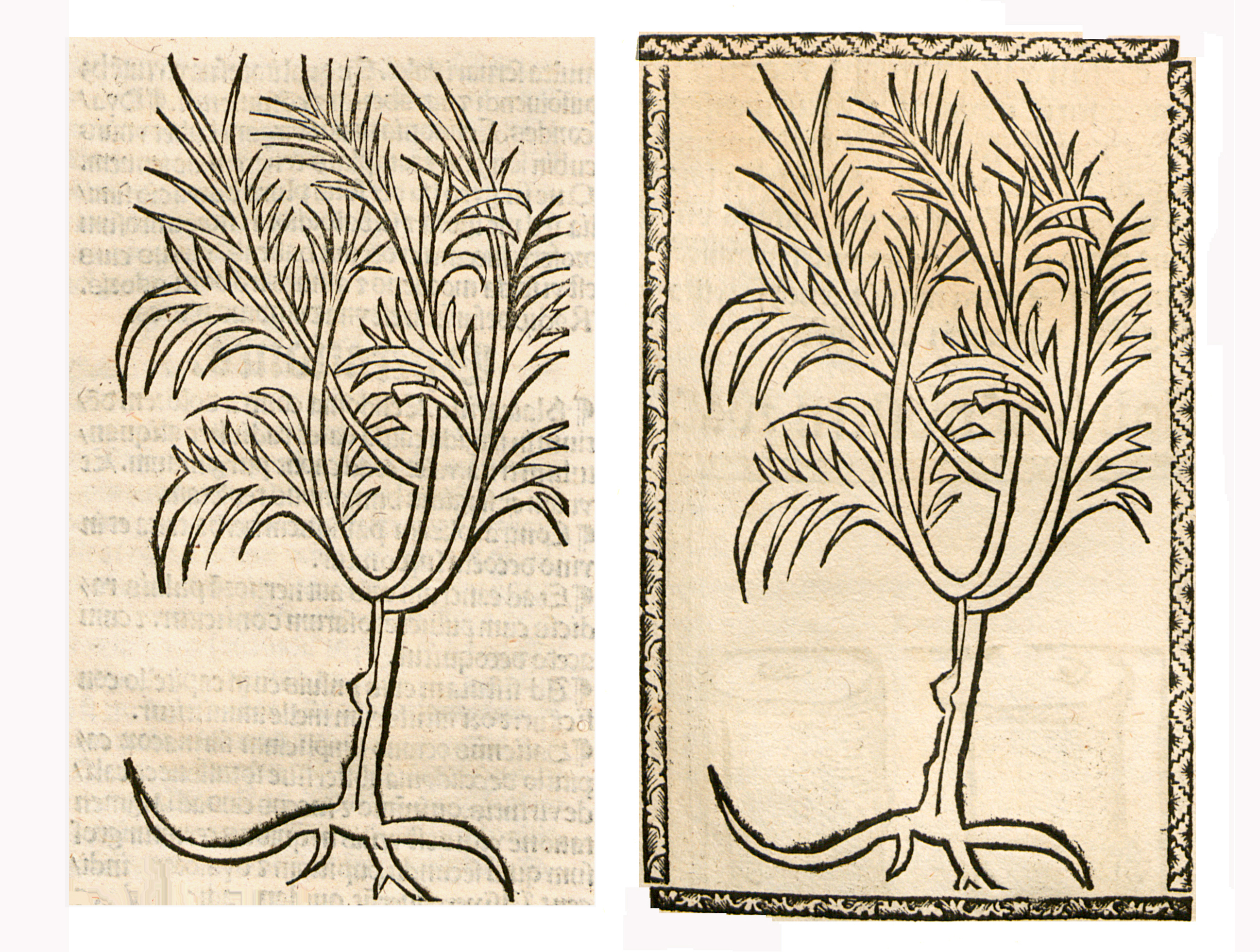 Abbildung vonː Tamariscen (Myricaria germanica)